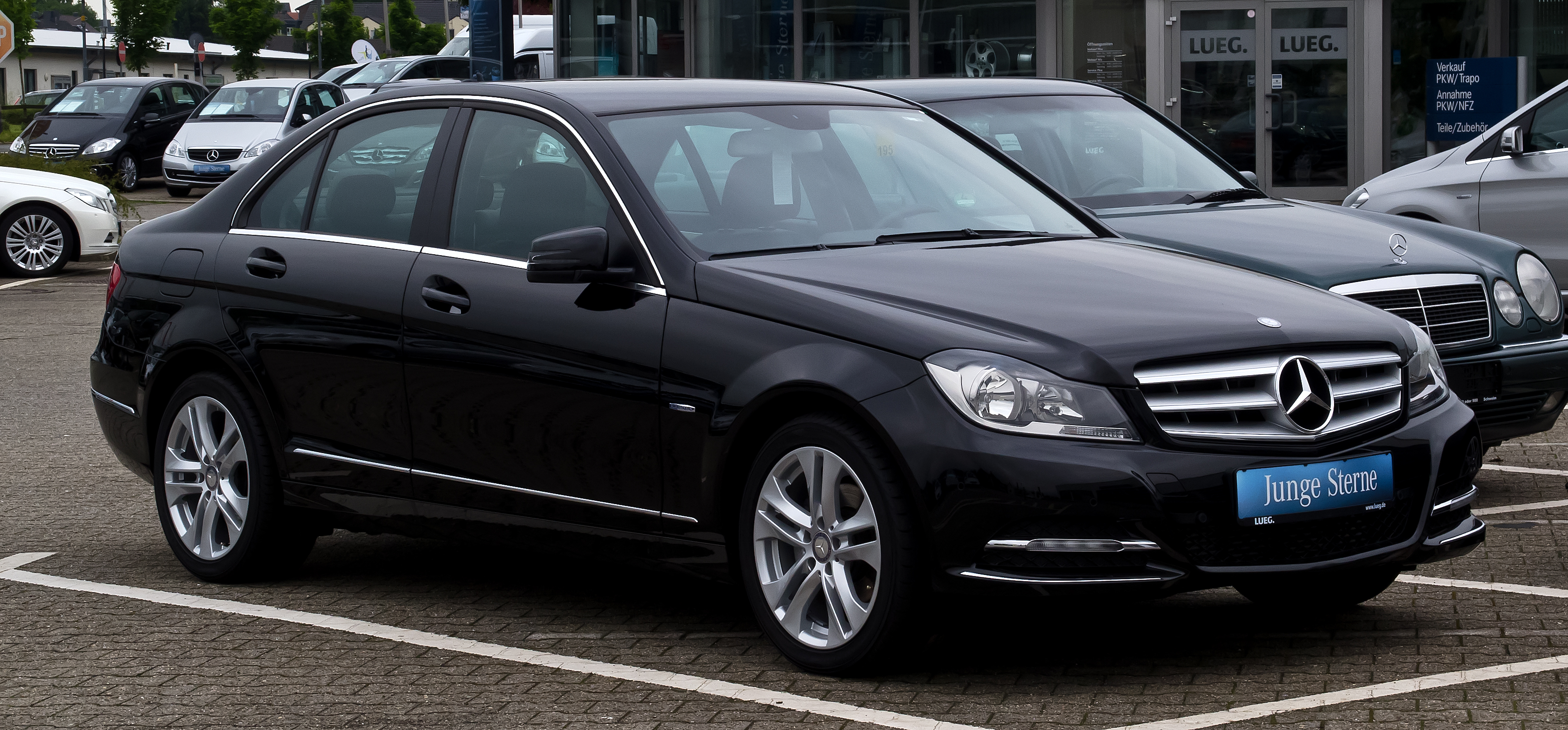 Mercedes-Benz C 180 BlueEFFICIENCY Avantgarde (W 204, Facelift)